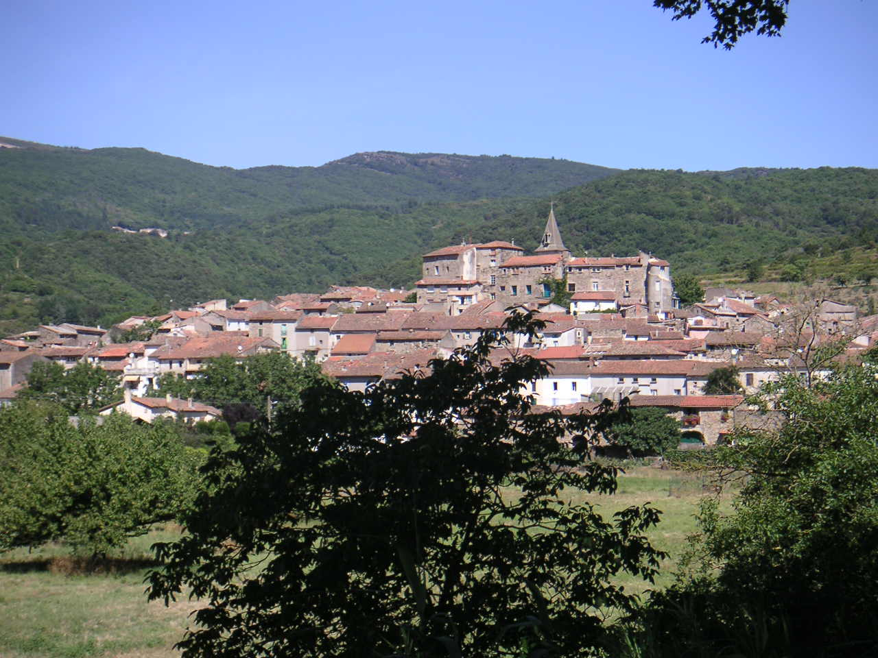 Vue sur la rive de l'Orb de la commune Le Poujol-sur-Orb. Photo personnelle - TouN - libre de droit Prise le : 11 août 2004